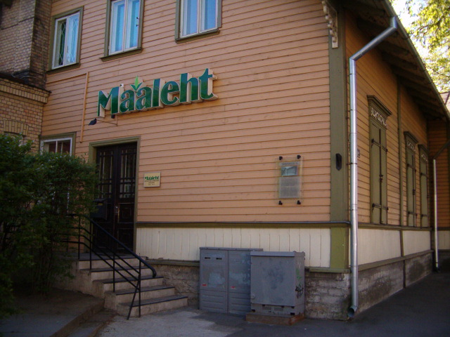 Maalehe toimetuse hoone, ehitatud 19. sajandil. Tallinn, Toompuiestee 16.